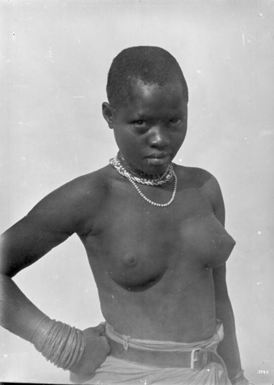 Junge Negerin